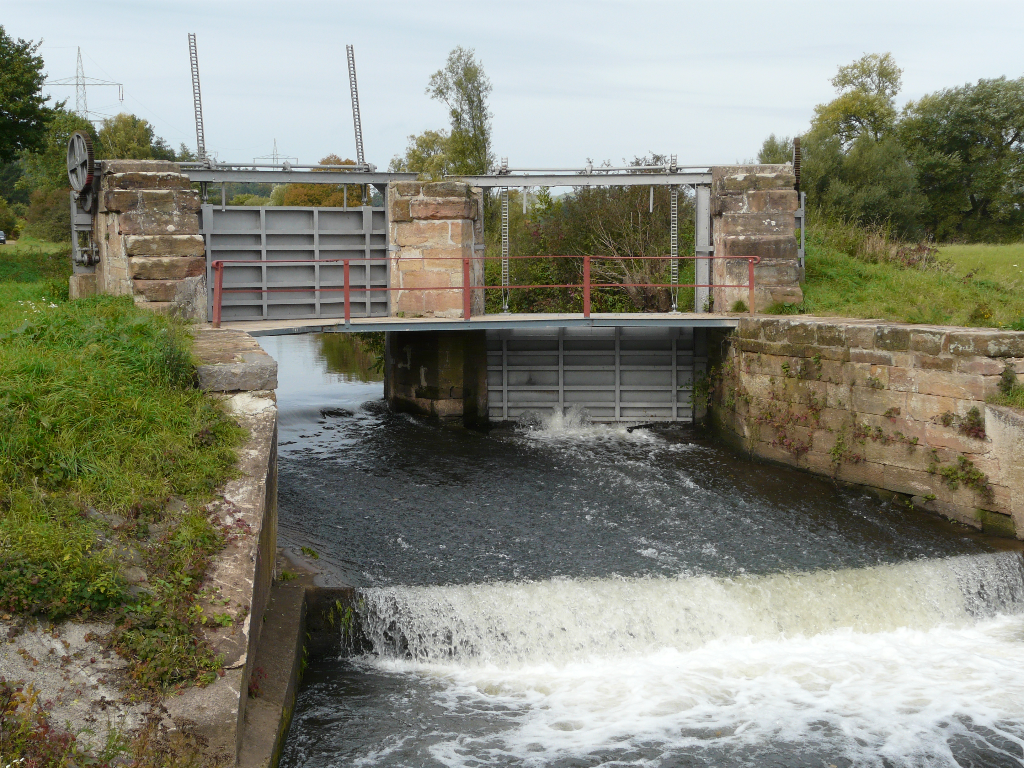 renoviertes Holzauwehr im Wiesental von Niederbexbach